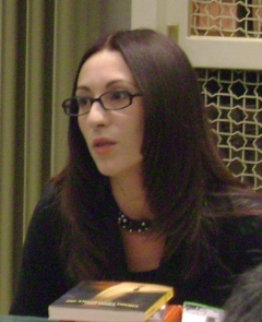 Simona Vinci, Biblioteca Poletti, Modena